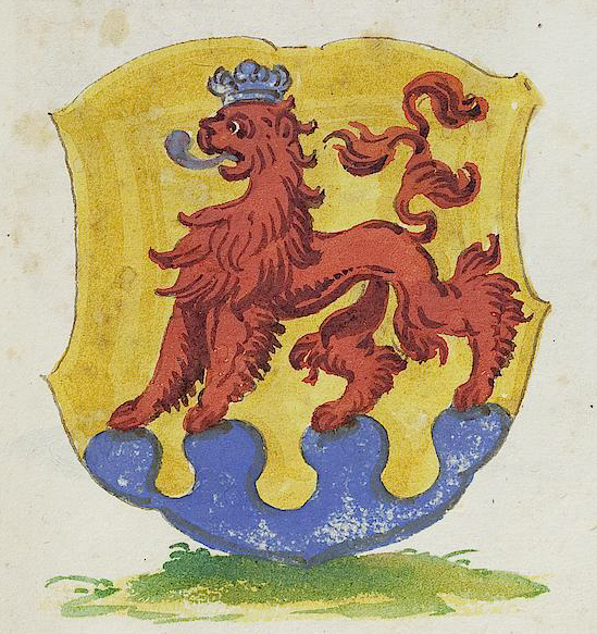 Wappen aus: David Wolleber: Chorographia Württemberg, [Schorndorf] 1591, Universitätsbibliothek Tübingen, Mh 6,1 Wappen des Hauses Calw